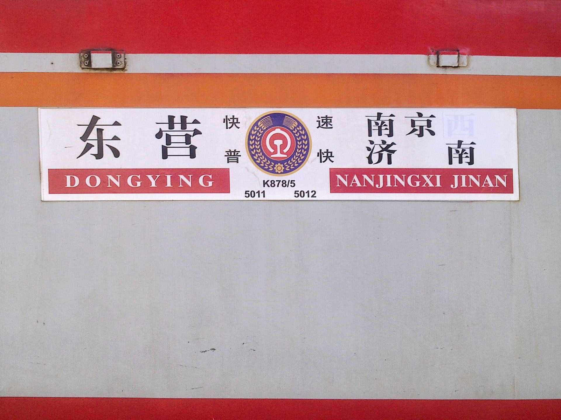 5011 套跑 K878 次列车水牌